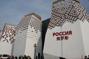 Внешний вид павильона России на ЭКСПО 2010